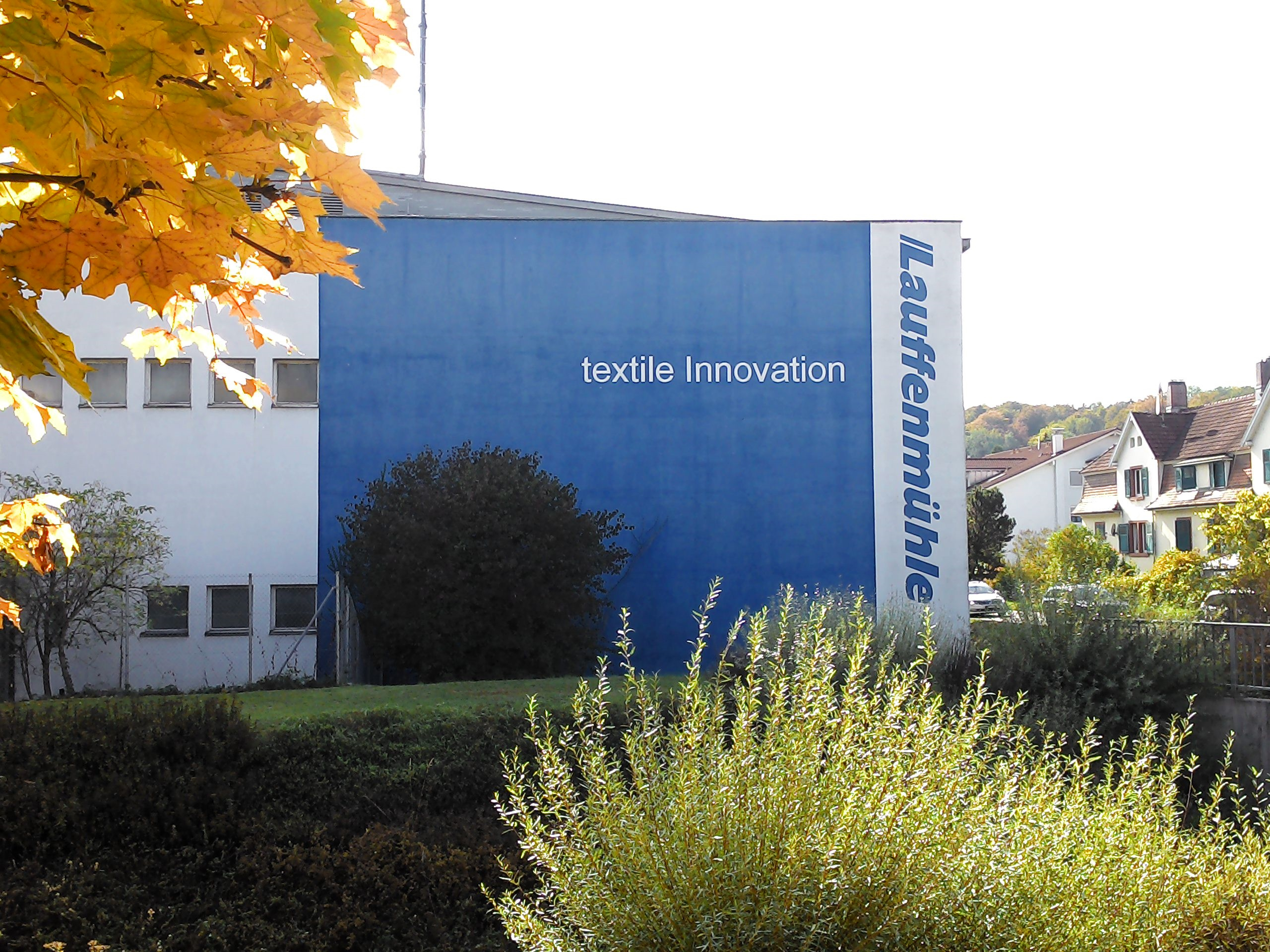 Textilunternehmen Lauffenmühle in Lauchringen, Landkreis Waldshut, Baden-Württemberg